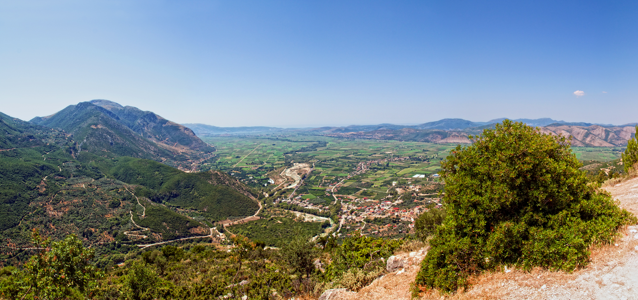 η πεδιάδα του Αχέροντα